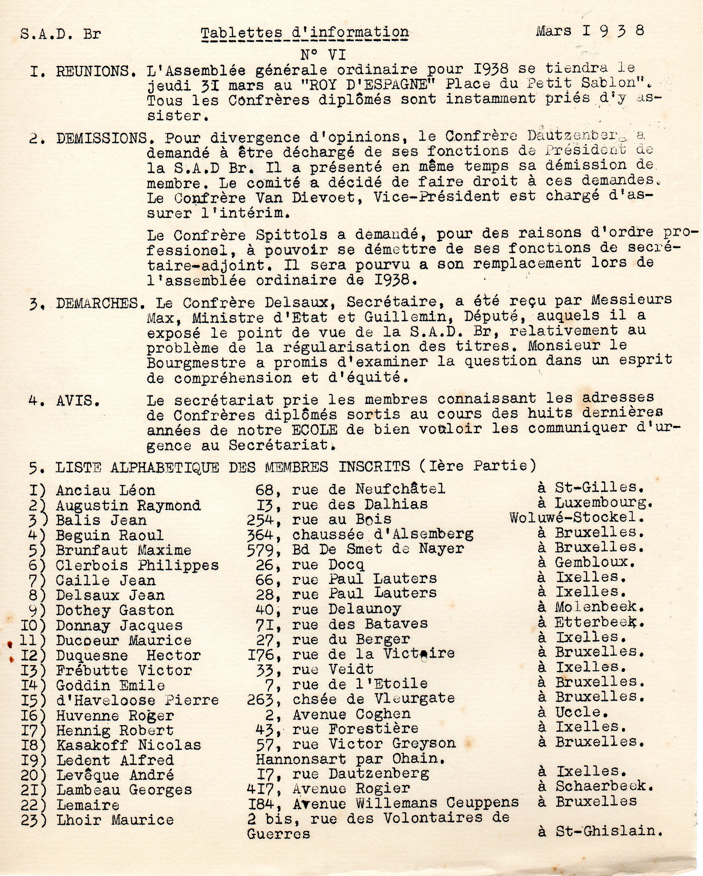 Page de titre de la revue "Tablettes d'Information" de la . n° 6 de mars 1938